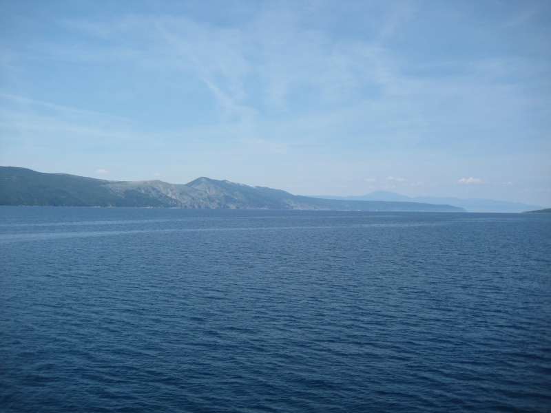 Srednja vrata, Cres, Croatia